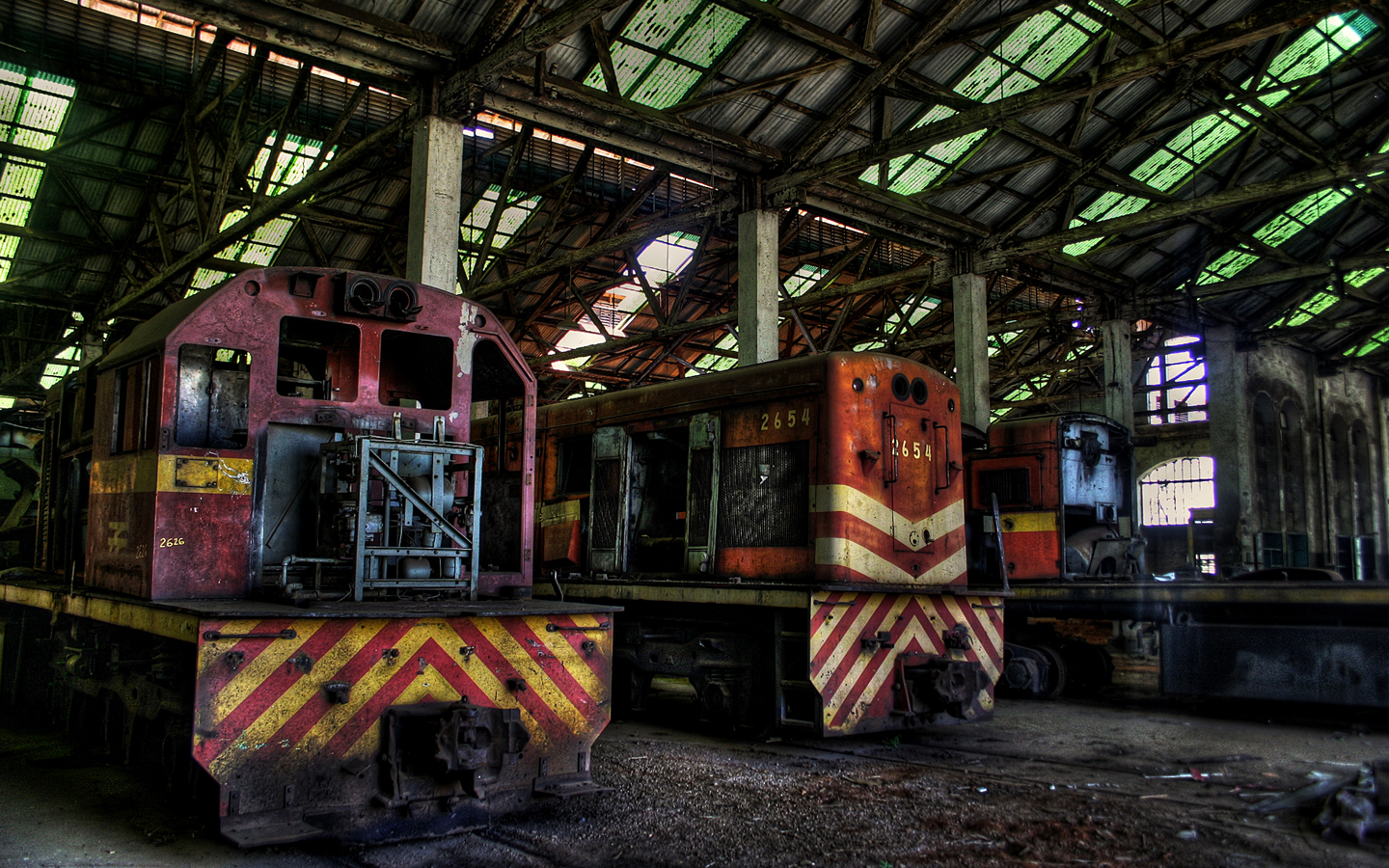 maquinado